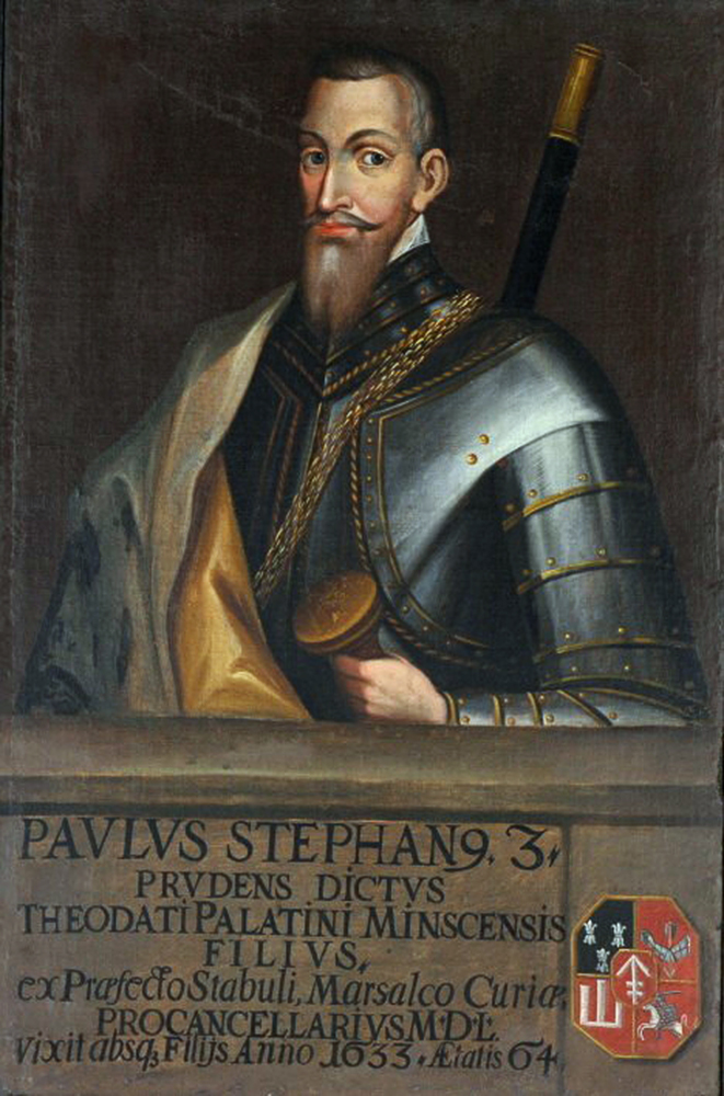 Беларуская (тарашкевіца): Партрэт Паўла Стэфана Сапегі гербу «Ліс» (1565—1635), дзяржаўнага і вайсковага дзеяча Вялікага Княства Літоўскага, канюшага вялікага і падканцлера літоўскага.